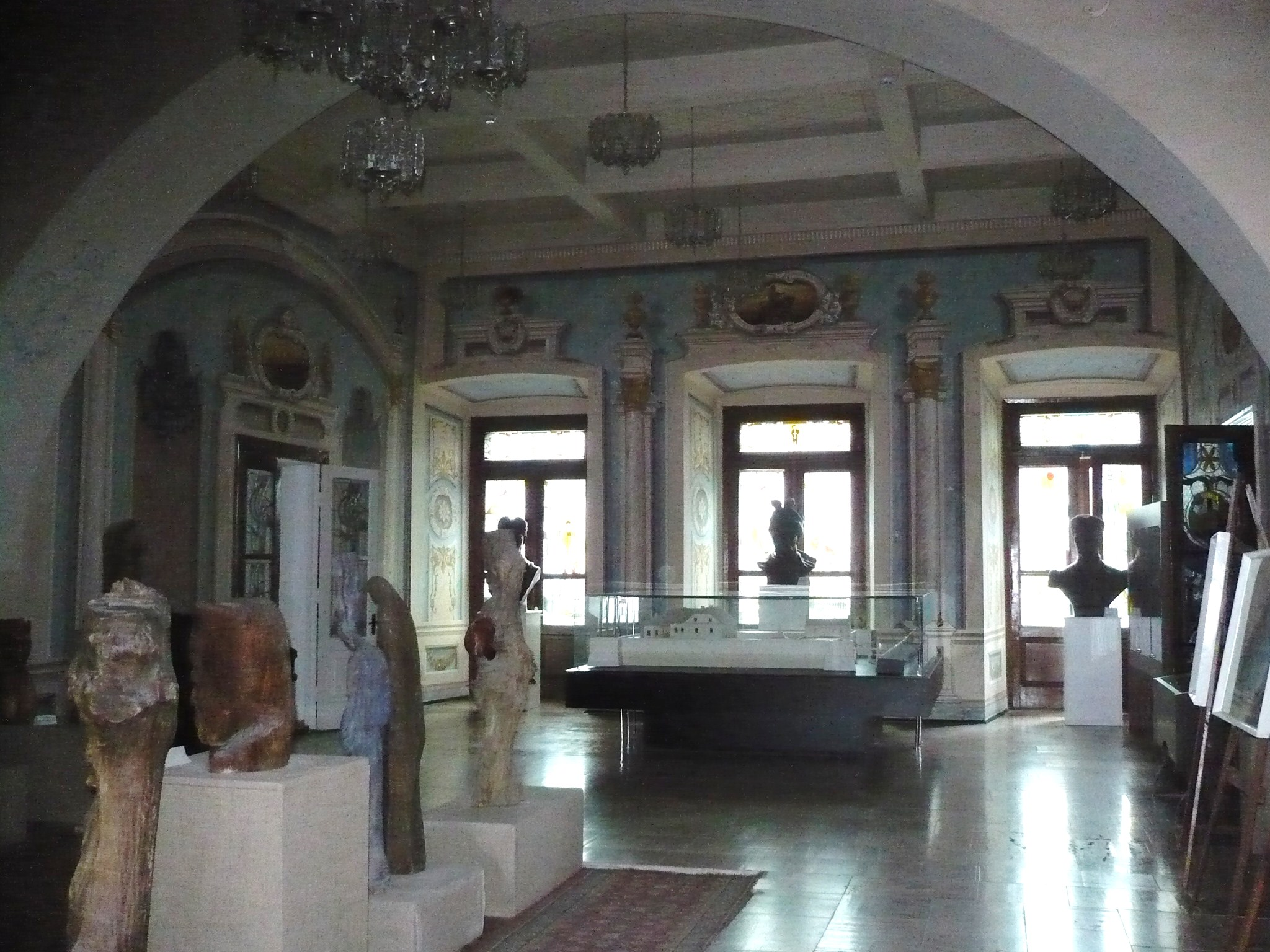 Zbaraż, sala zamku